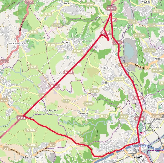 Le tracé du grand Prix de l’Automobile Club de France de Lyon en 1924, d'après les indications de : .